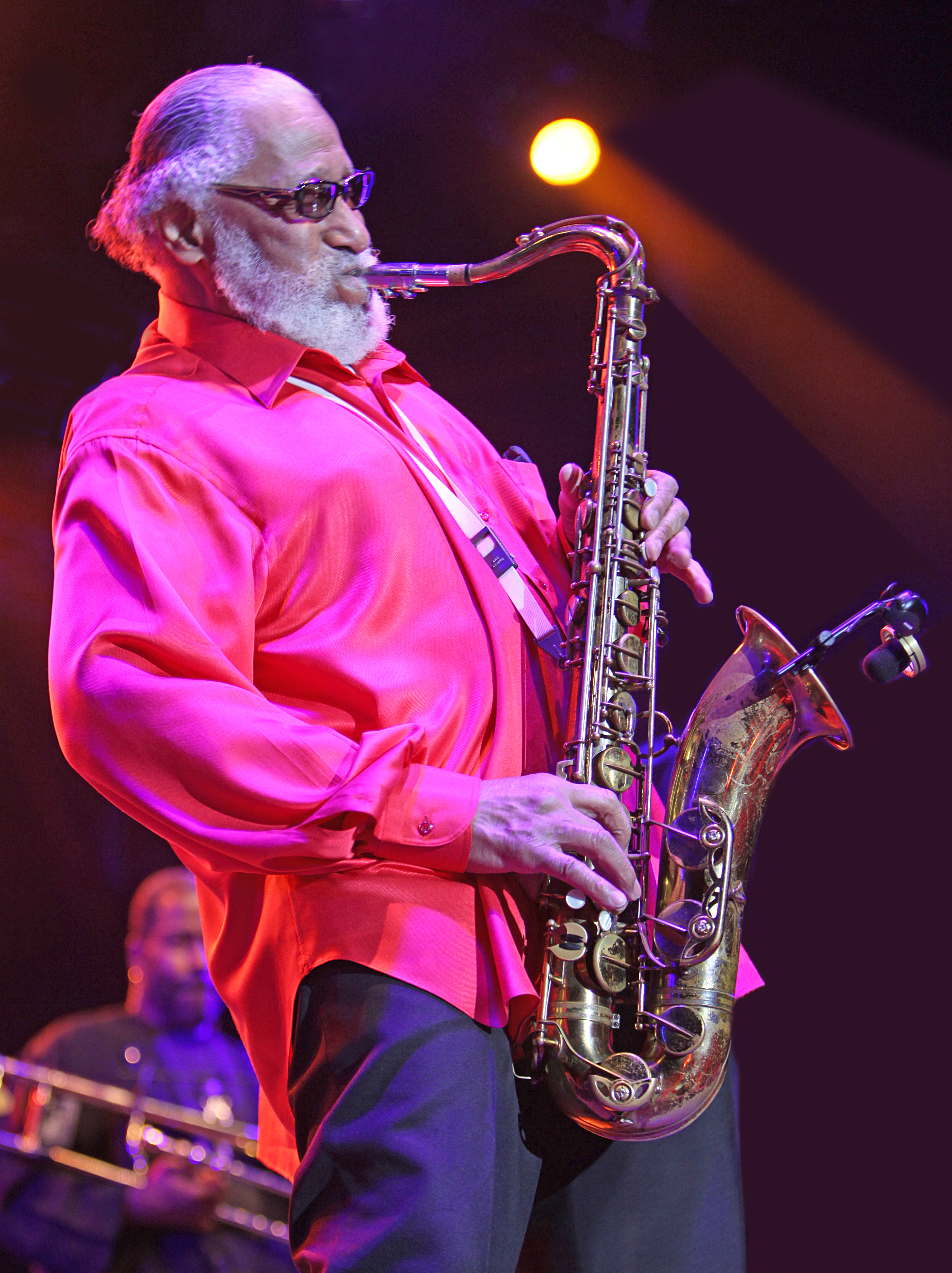 Sonny Rollins at Stockholm Jazz Fest 2009